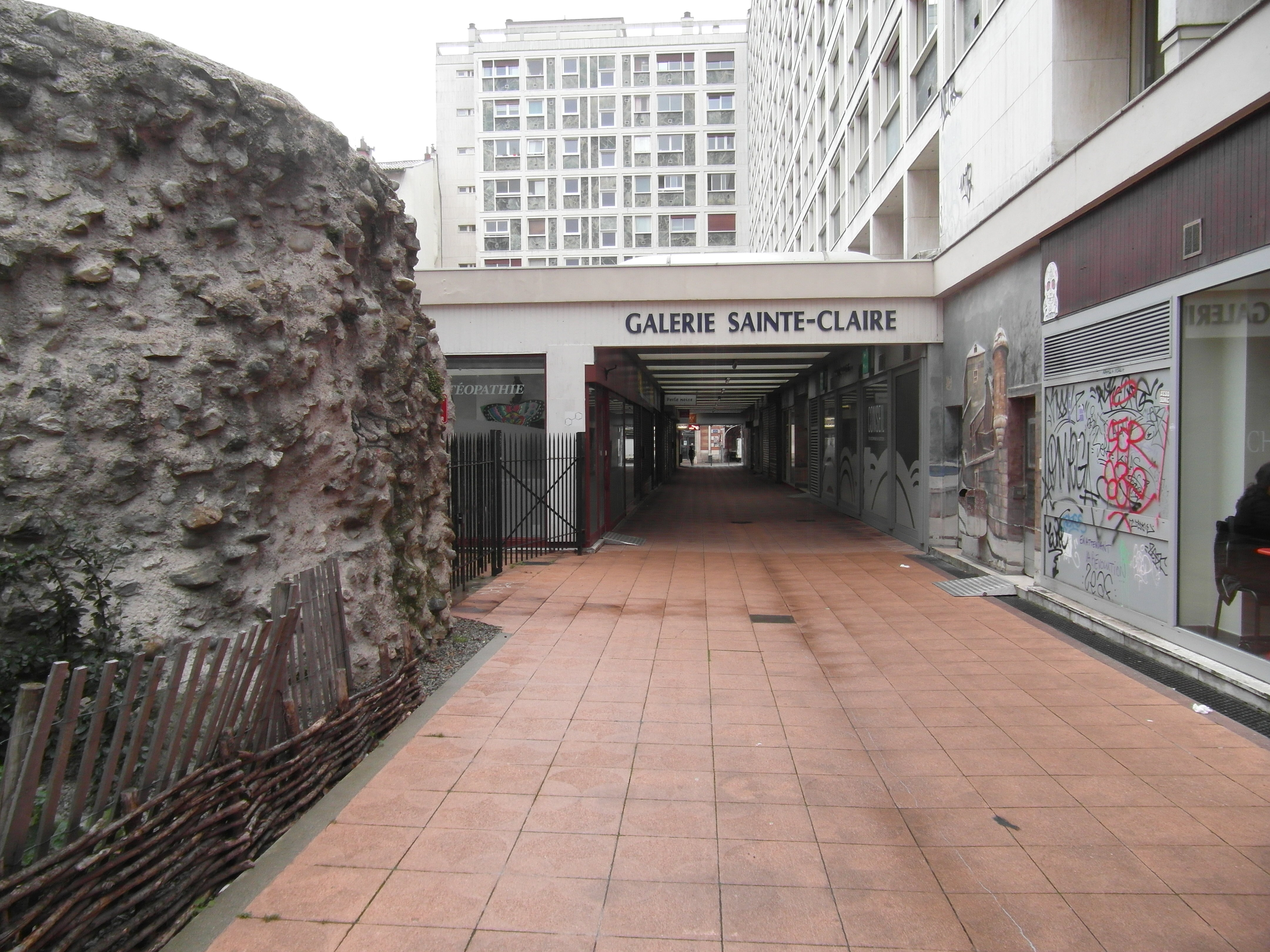 Galerie Sainte-Claire et rempart romain en mars 2019